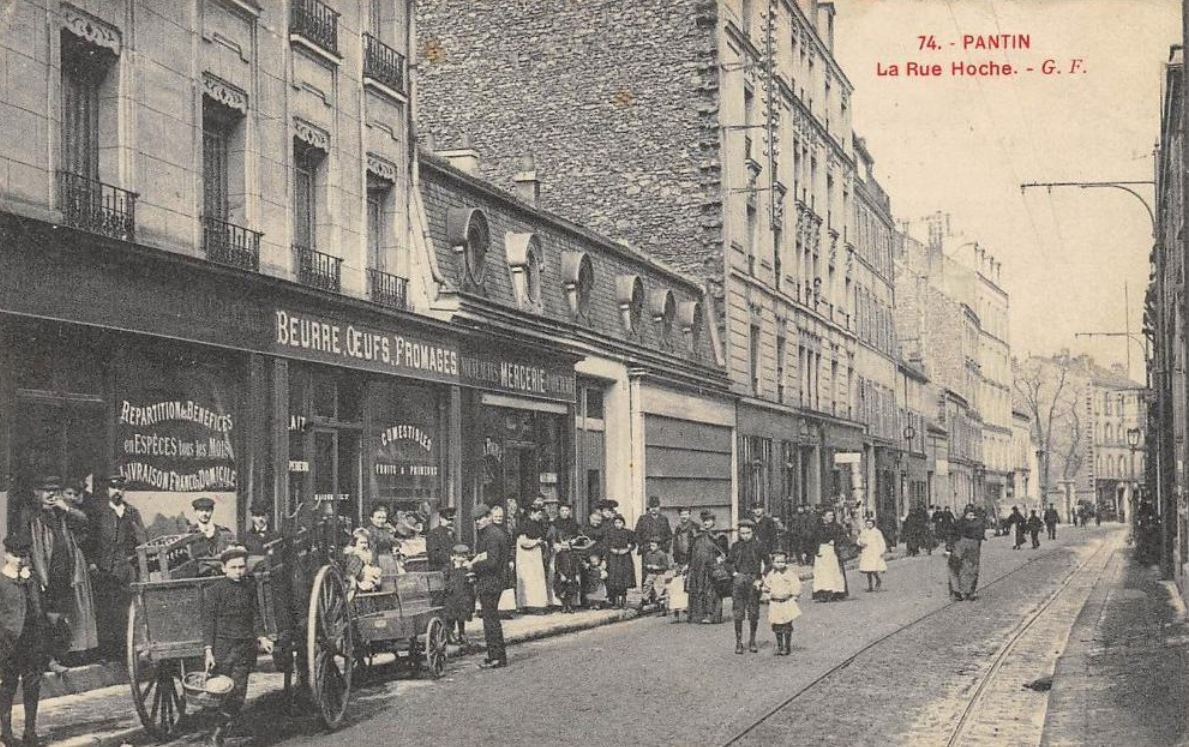 Pantin.Rue Hoche.Carriole